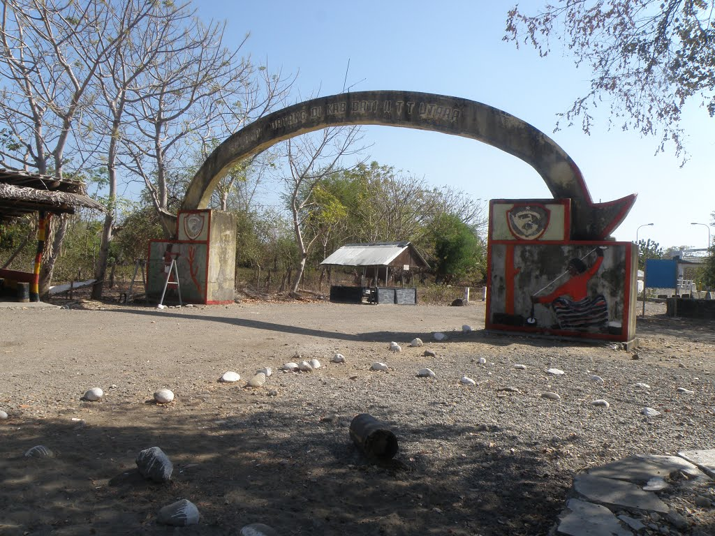 Osttimor